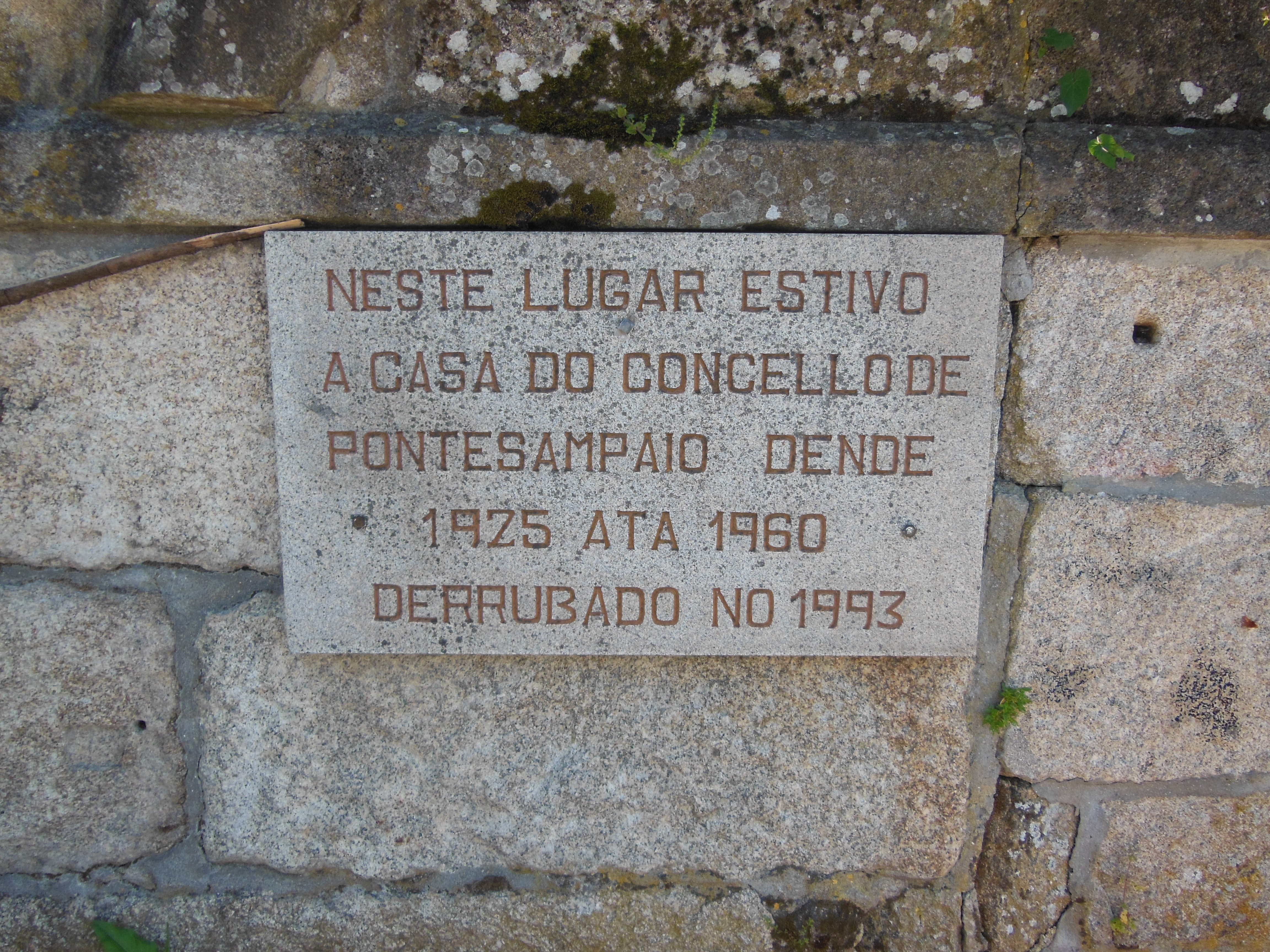 Placa no lugar onde estaba a Casa Consistorial de Ponte Sampaio